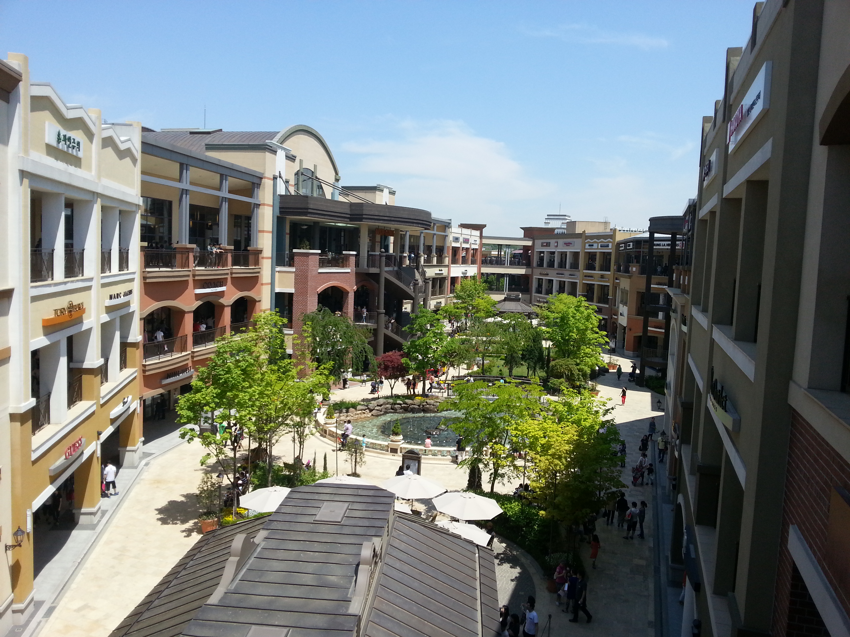 坡州奥特莱斯